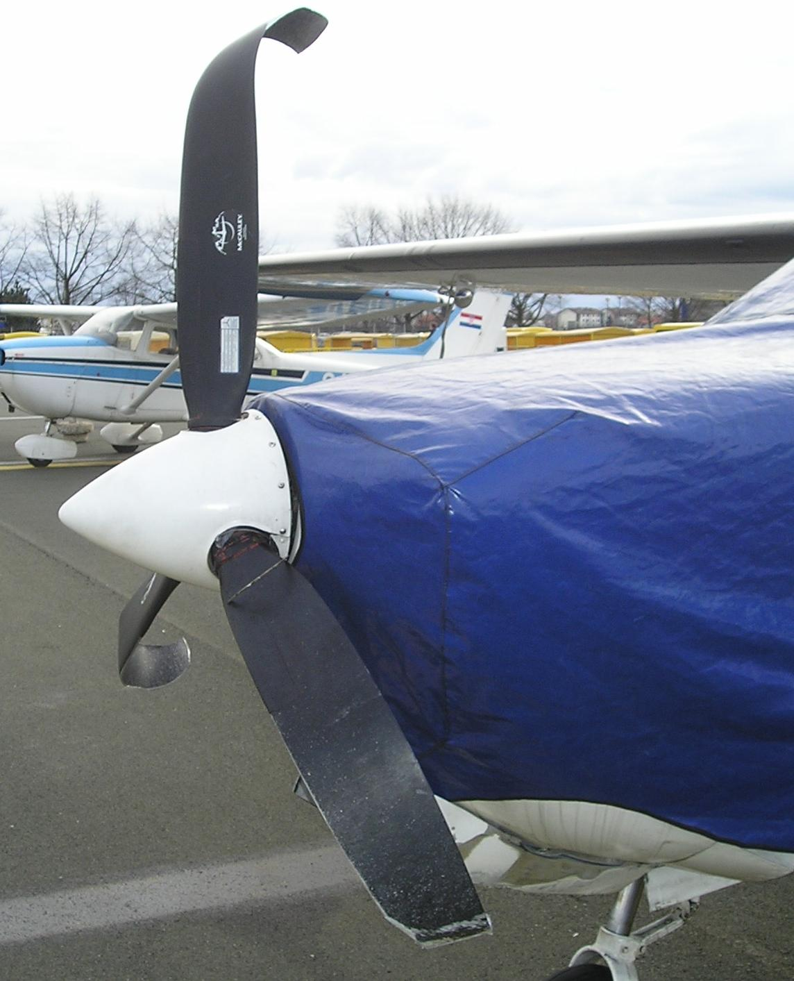 Broken propeller